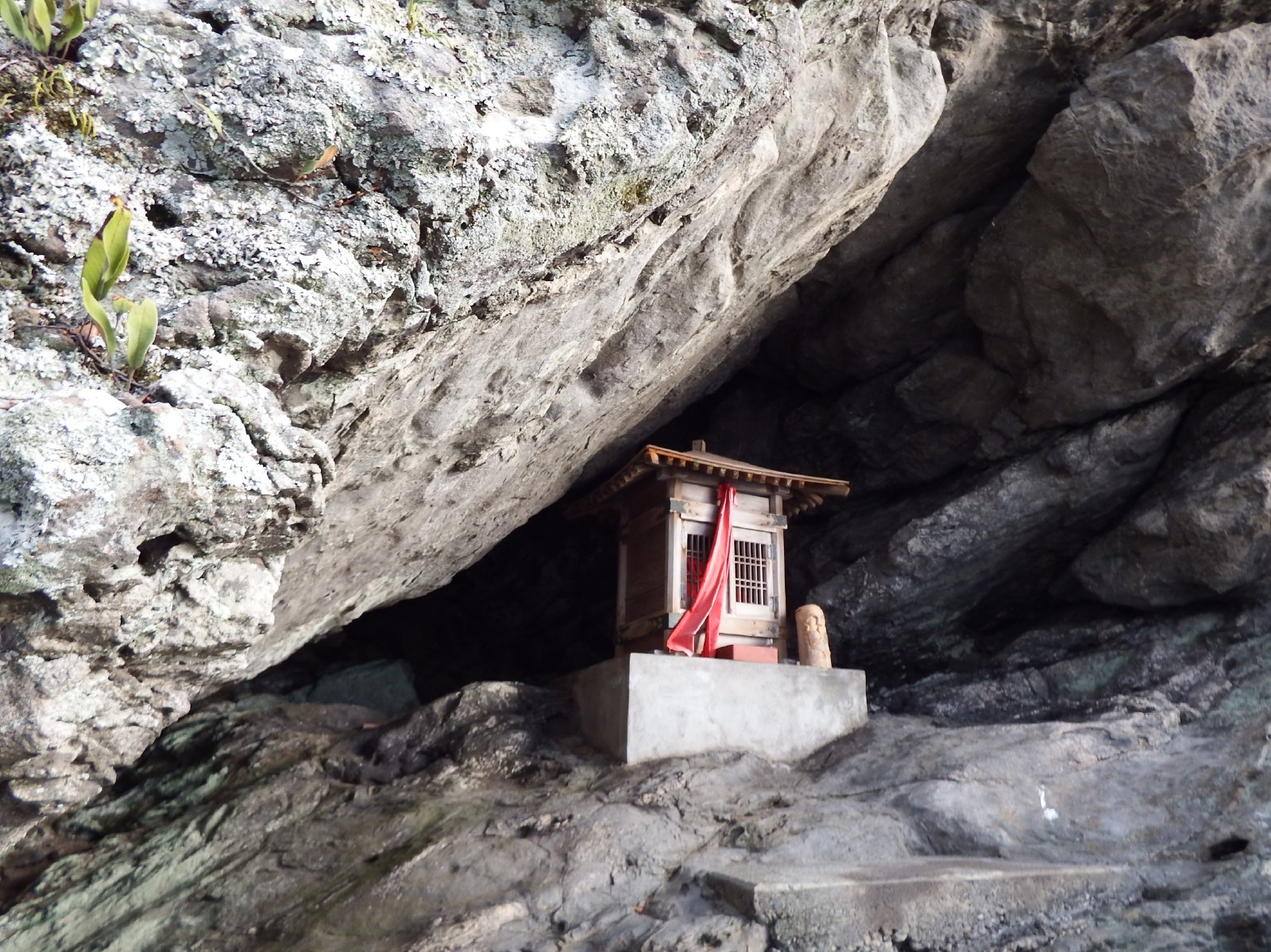 不動巖の東の窟